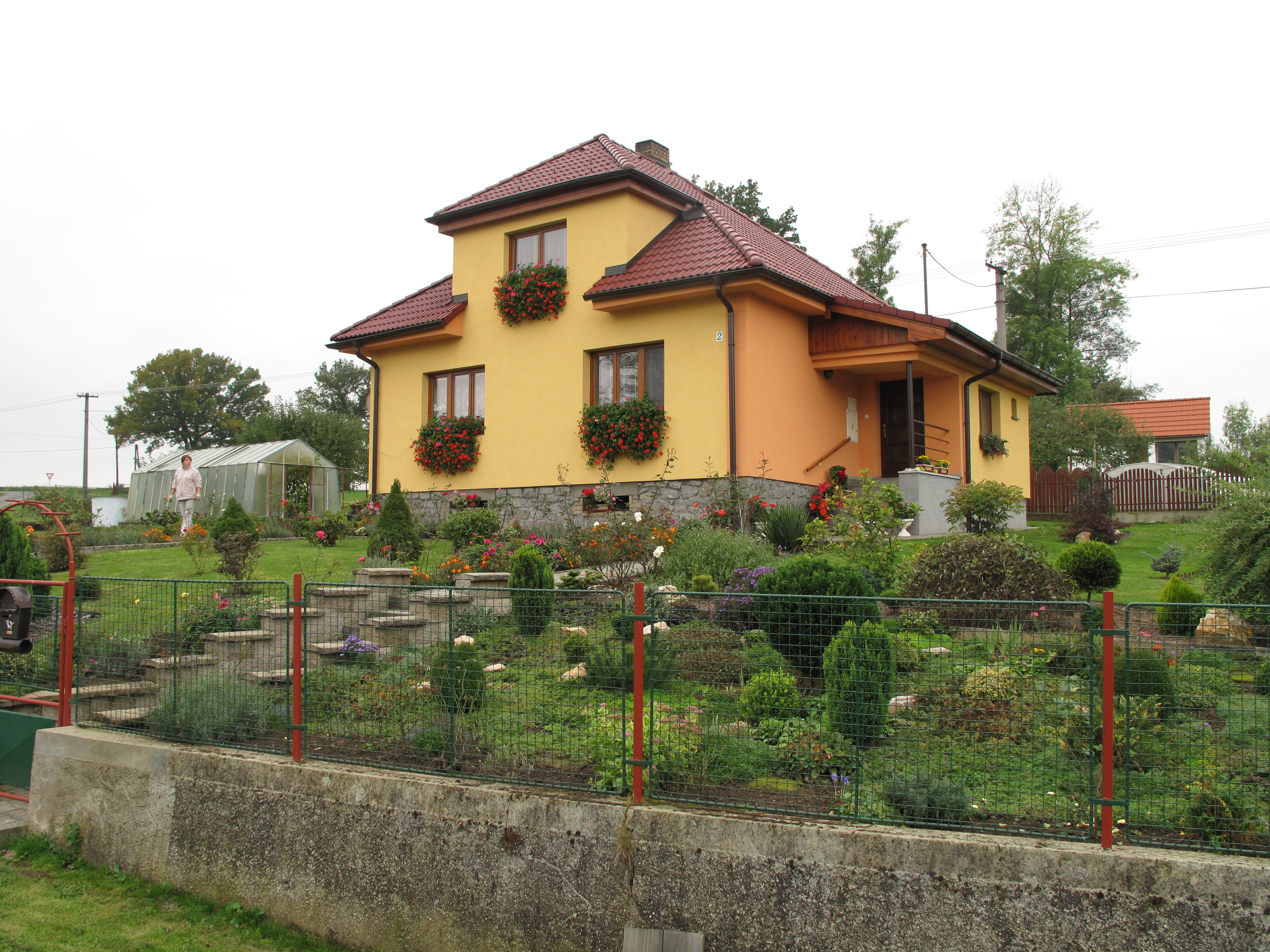 Žlutý dům ve Vosné. Okres Tábor, Česká republika.